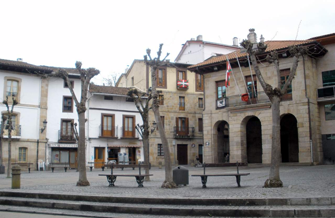 Eskoriatza, Gipuzkoa - Plaza Fernando Eskoriatza y Ayuntamiento